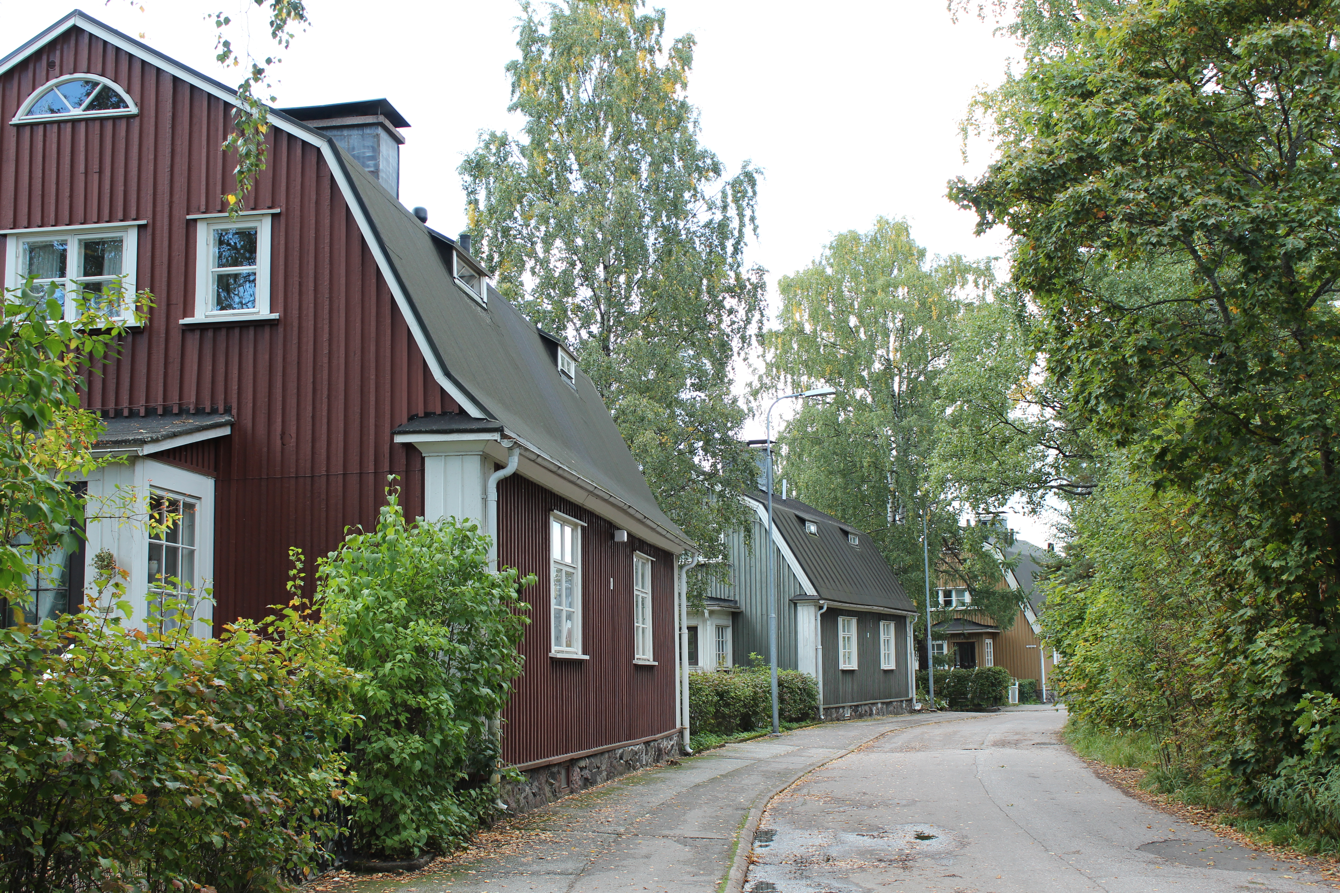 Rakennuksia Puu-Käpylässä